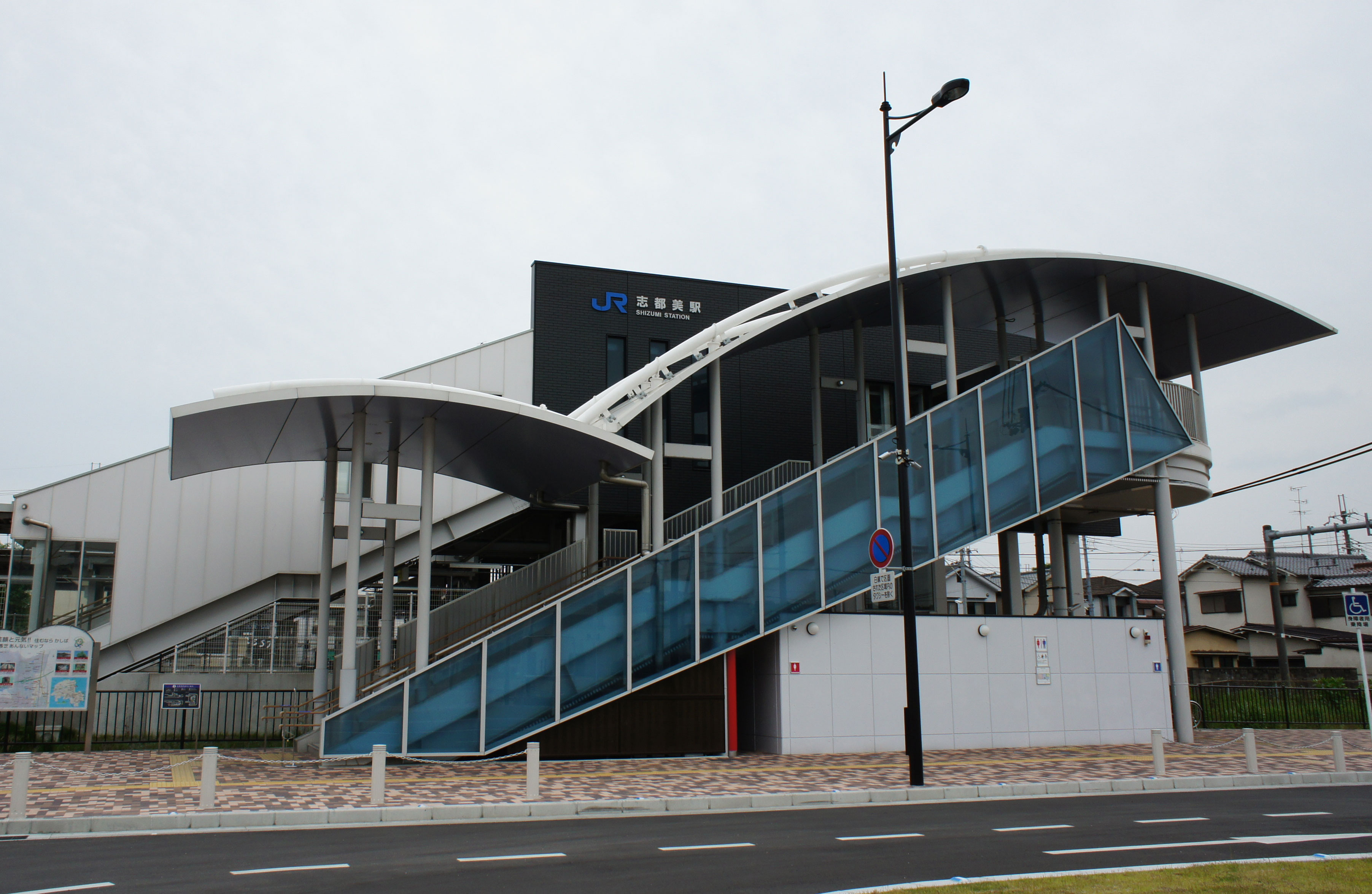 西日本旅客鉄道 和歌山線 志都美駅